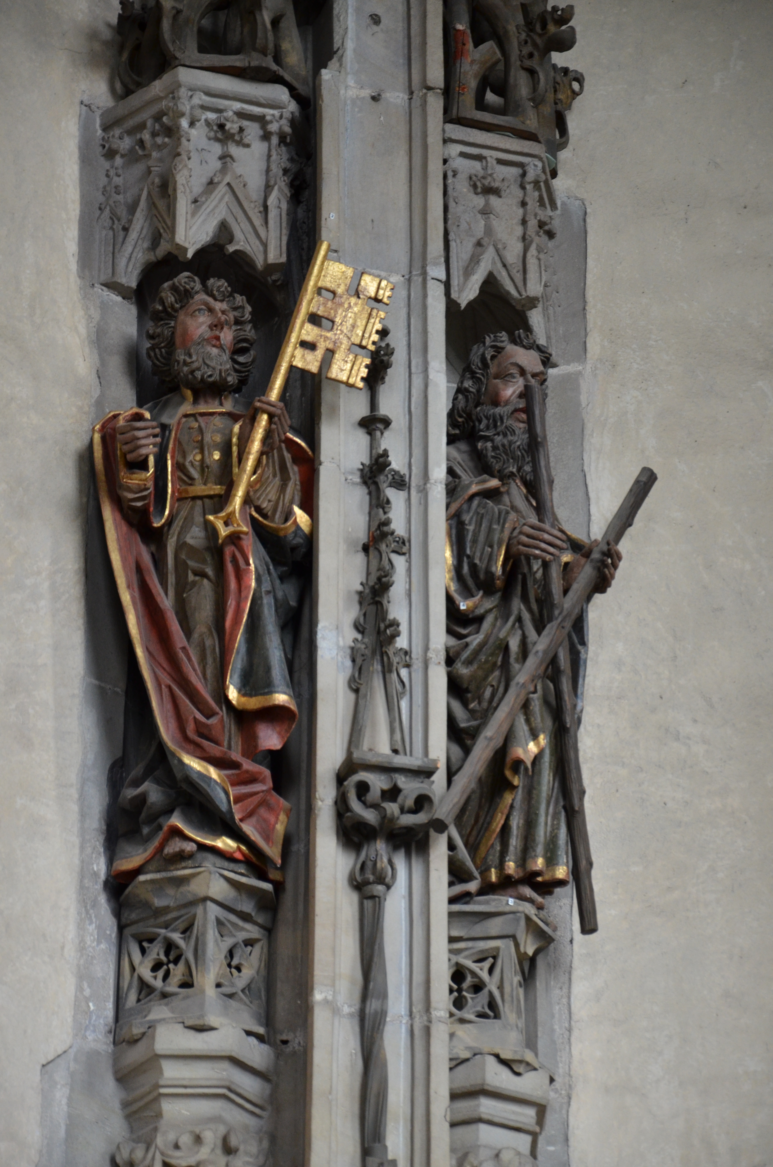 Sochy apoštolů 3 - Křivoklát, Petr (klíč) a Ondřej (kříž ve tvaru X)